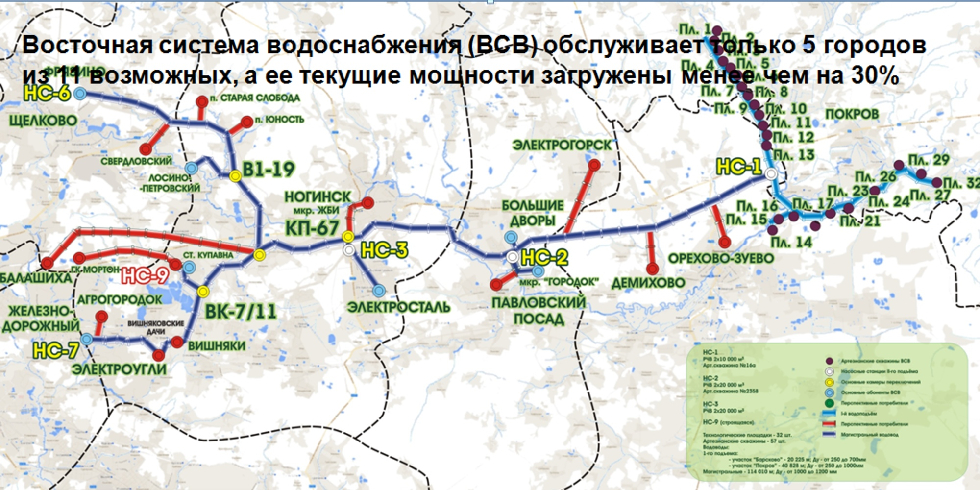 Восточная система водоснабжения карта